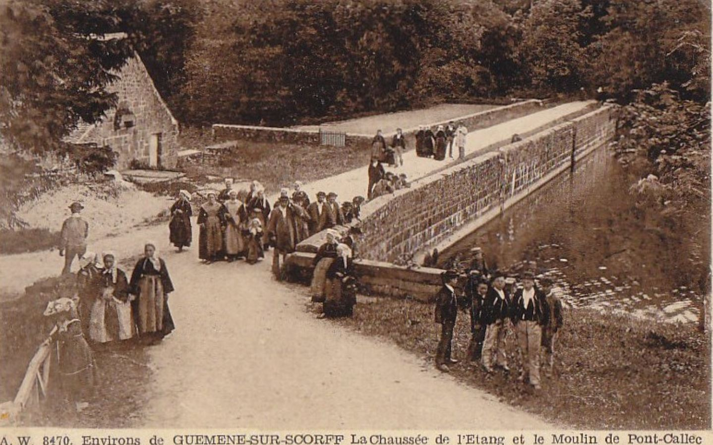 La chaussée de l'étang et le moulin de Pontcallec à Berné au début du XXe siècle.